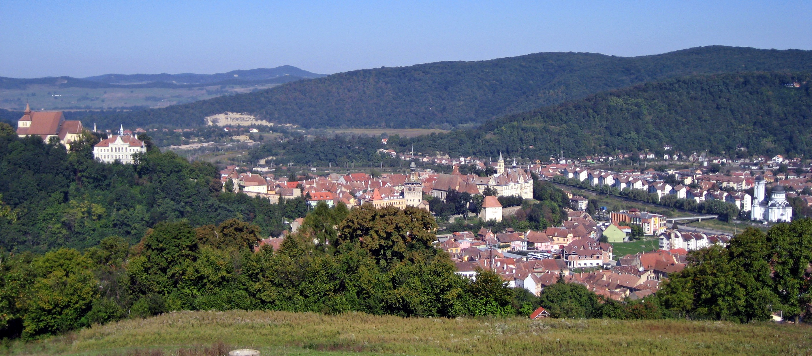 Sighişoara